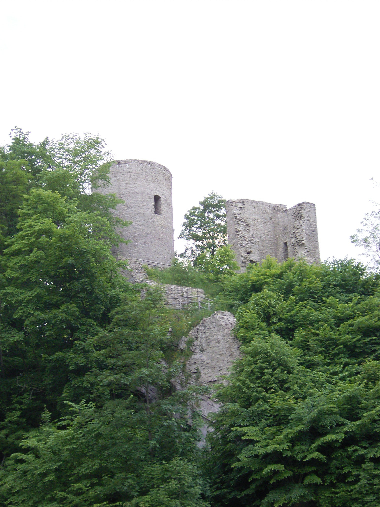 Burgruine Lauterstein in Niederlauterstein im Sommer 2005